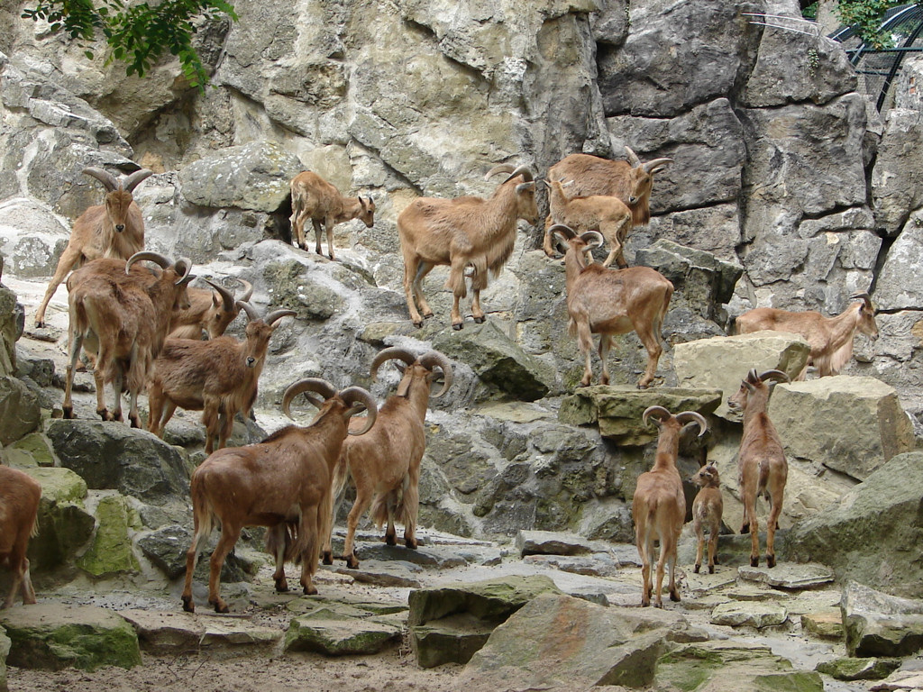 Tier im Zoologischen Garten Berlin